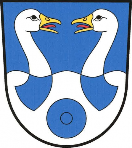 znak, Mezná, okres Tábor